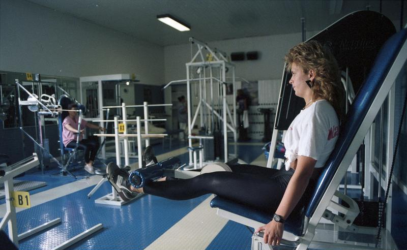 Juni 1988 Bonn